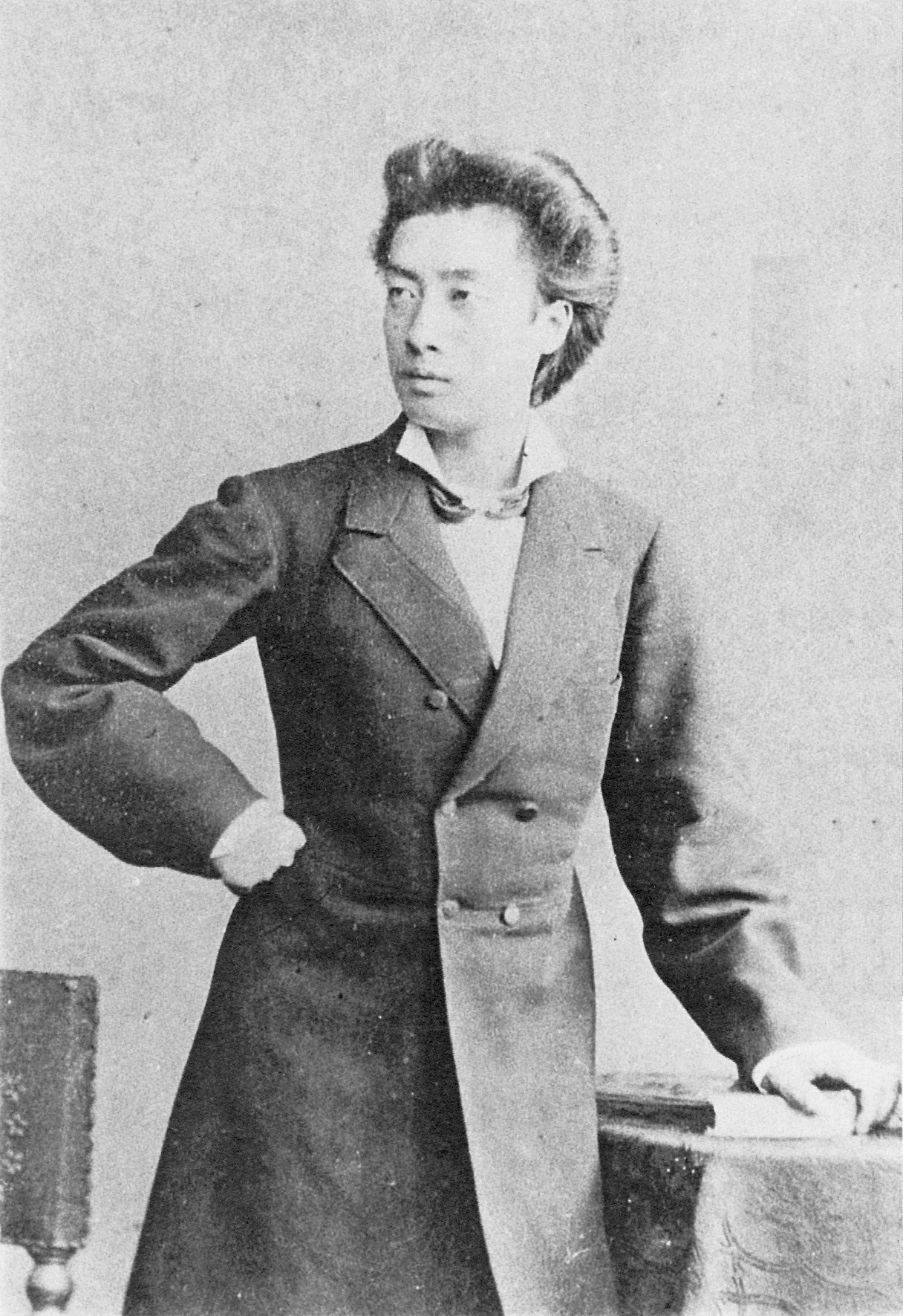 酒井忠宝の肖像写真。